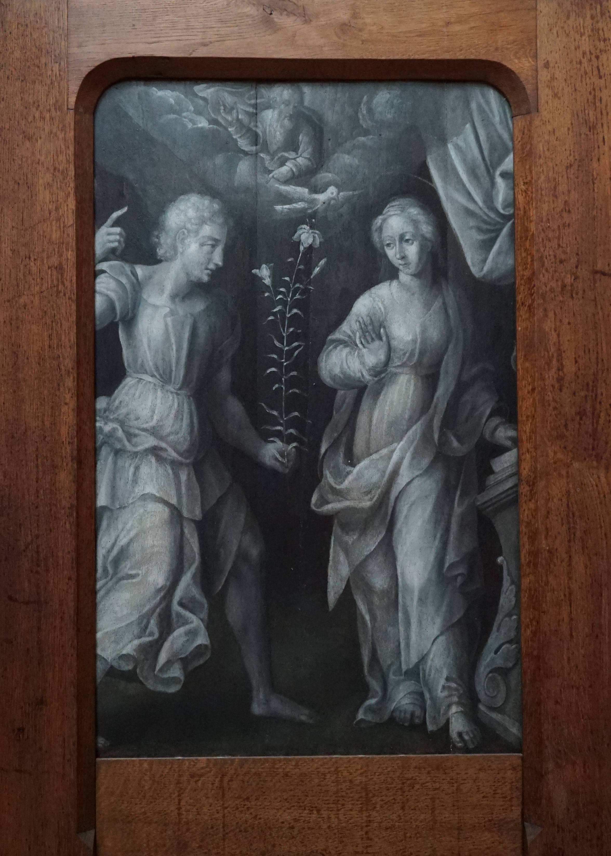 à intérieur de l'église.